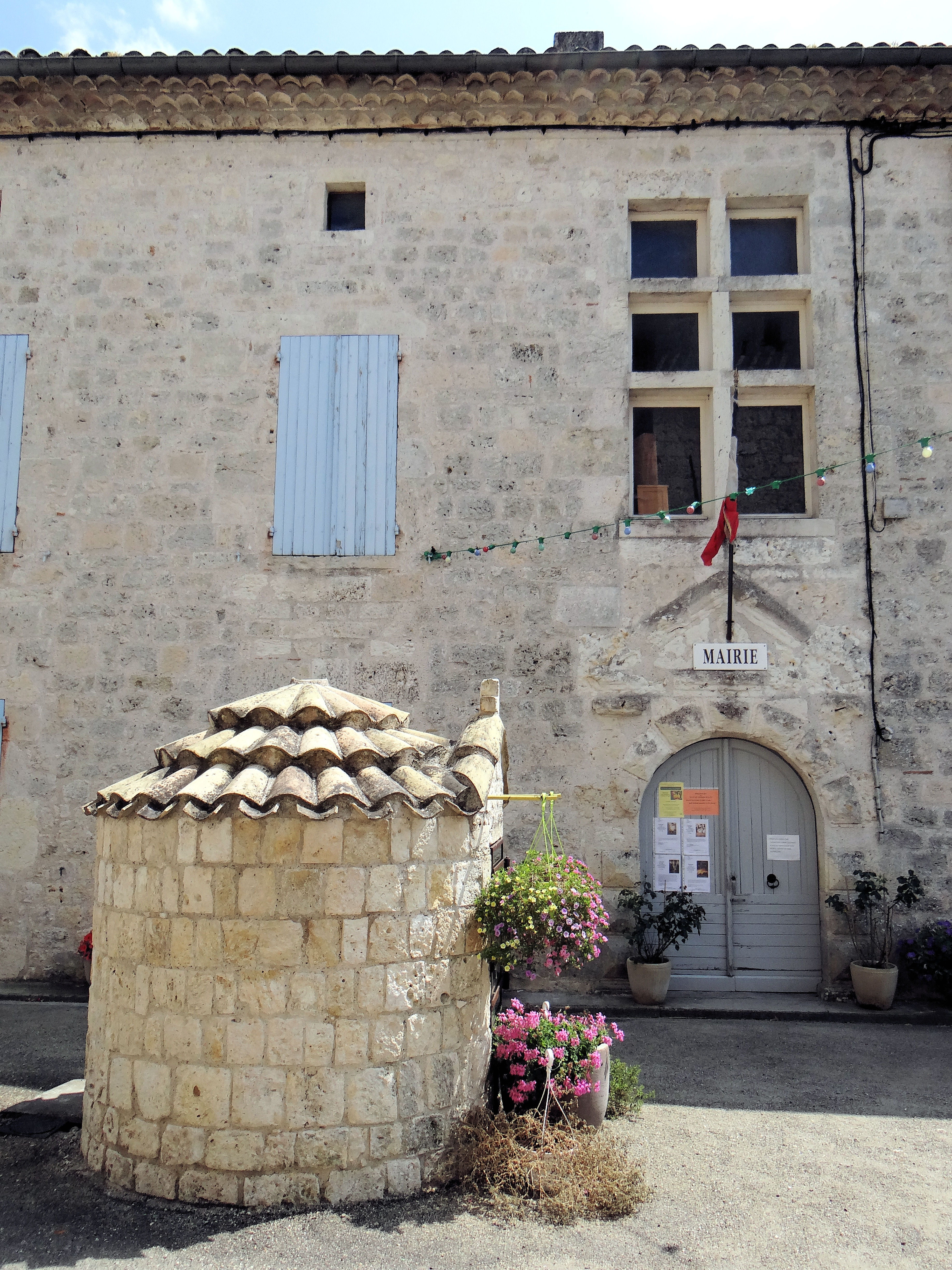 Lacour (Tarn-et-Garonne) - Mairie